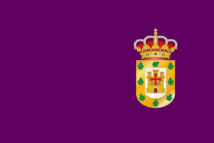 Bandera Municipal de Torija (Guadalajara)